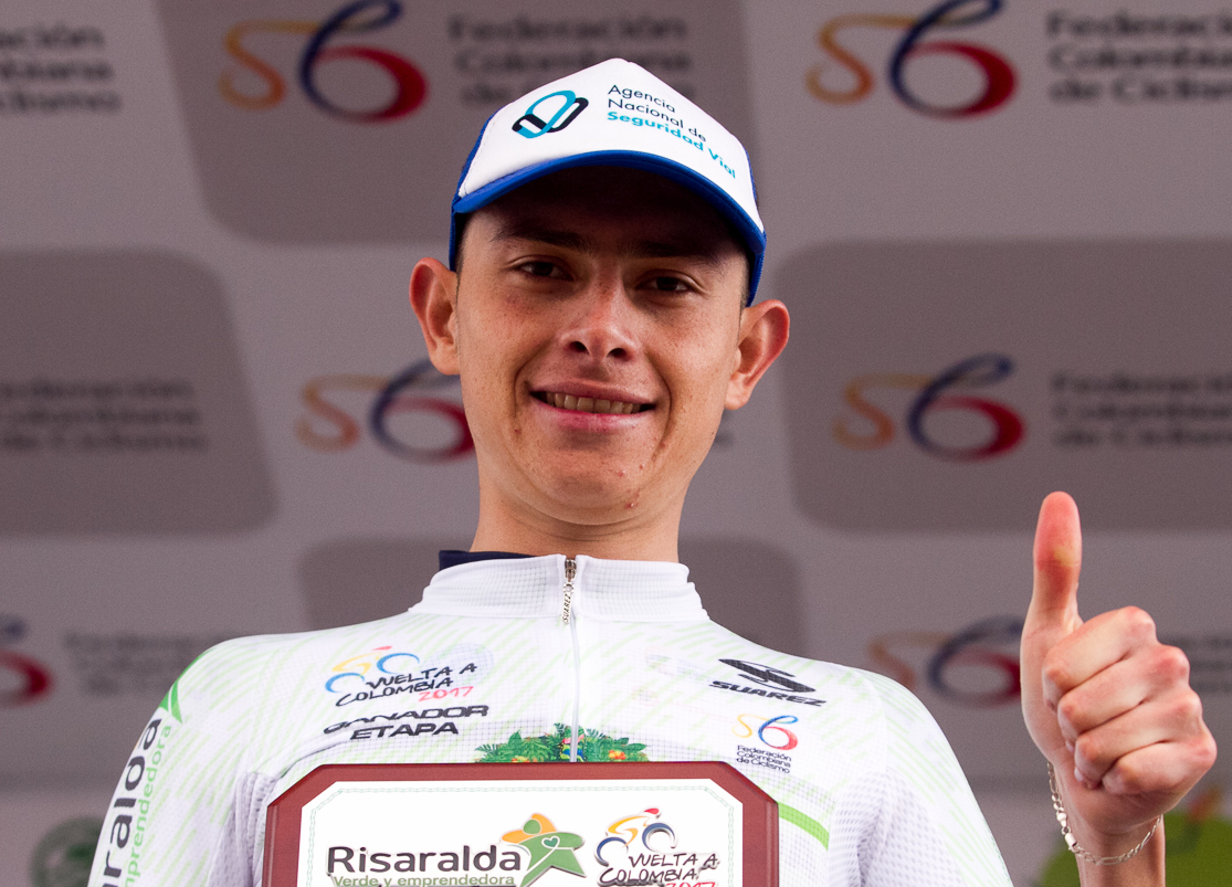 Miguel Ángel Reyes en el podio Eta.9 Vuelta a Colombia 2017 Jueves 10 de agosto de 2017. 137Kms La Dorada - Alto de Letras.